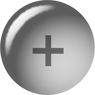 molecule model